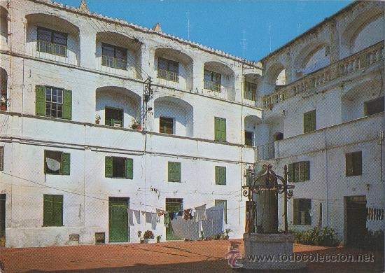 Això és antes de la reforma